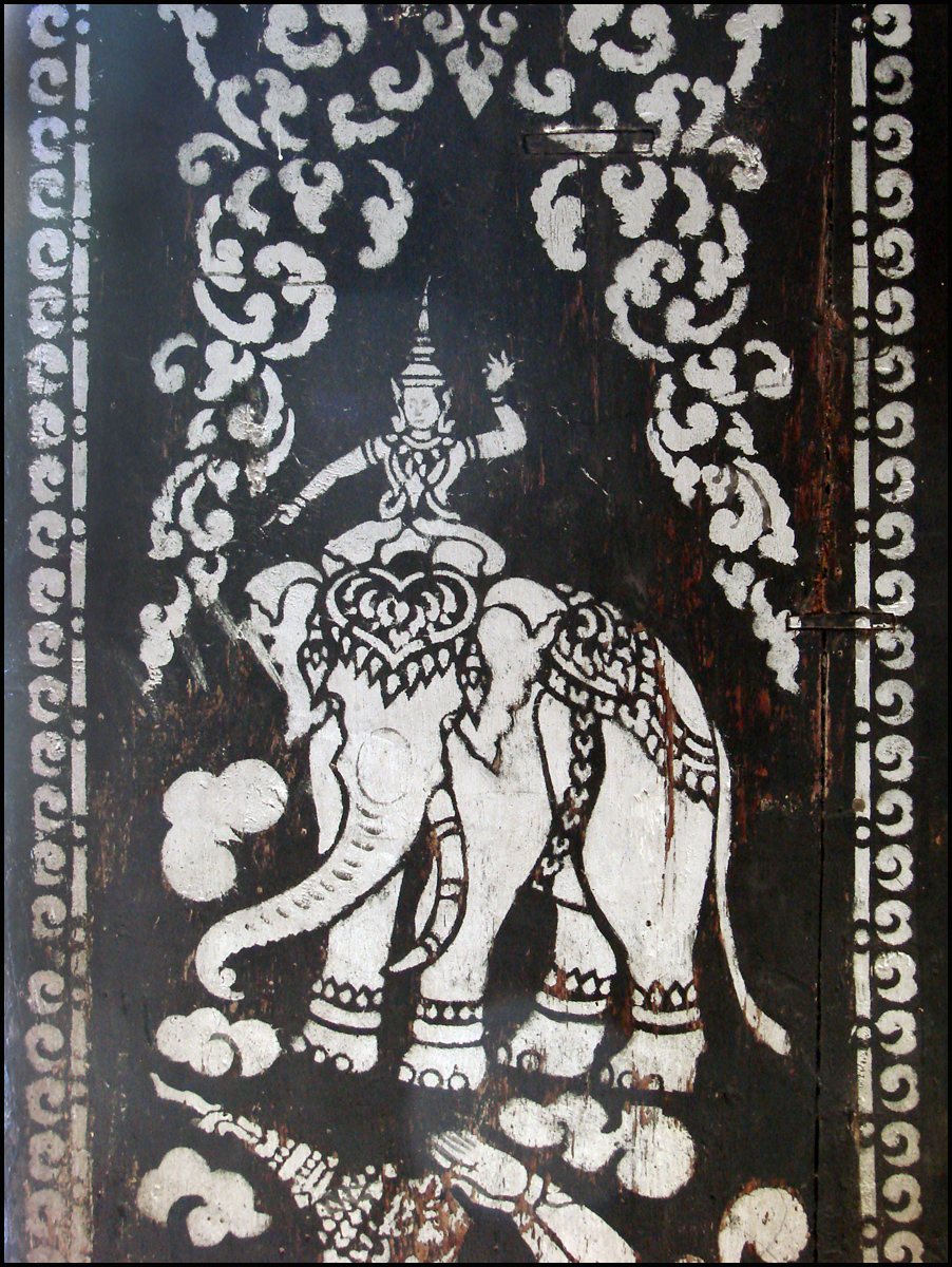 Décor de fenêtre illustrant le Ramayana Le Vat That Luang (monastère du grand Stupa) est dans le style de Luang Prabang 1. Le sanctuaire possède une nef triple de neuf travées.